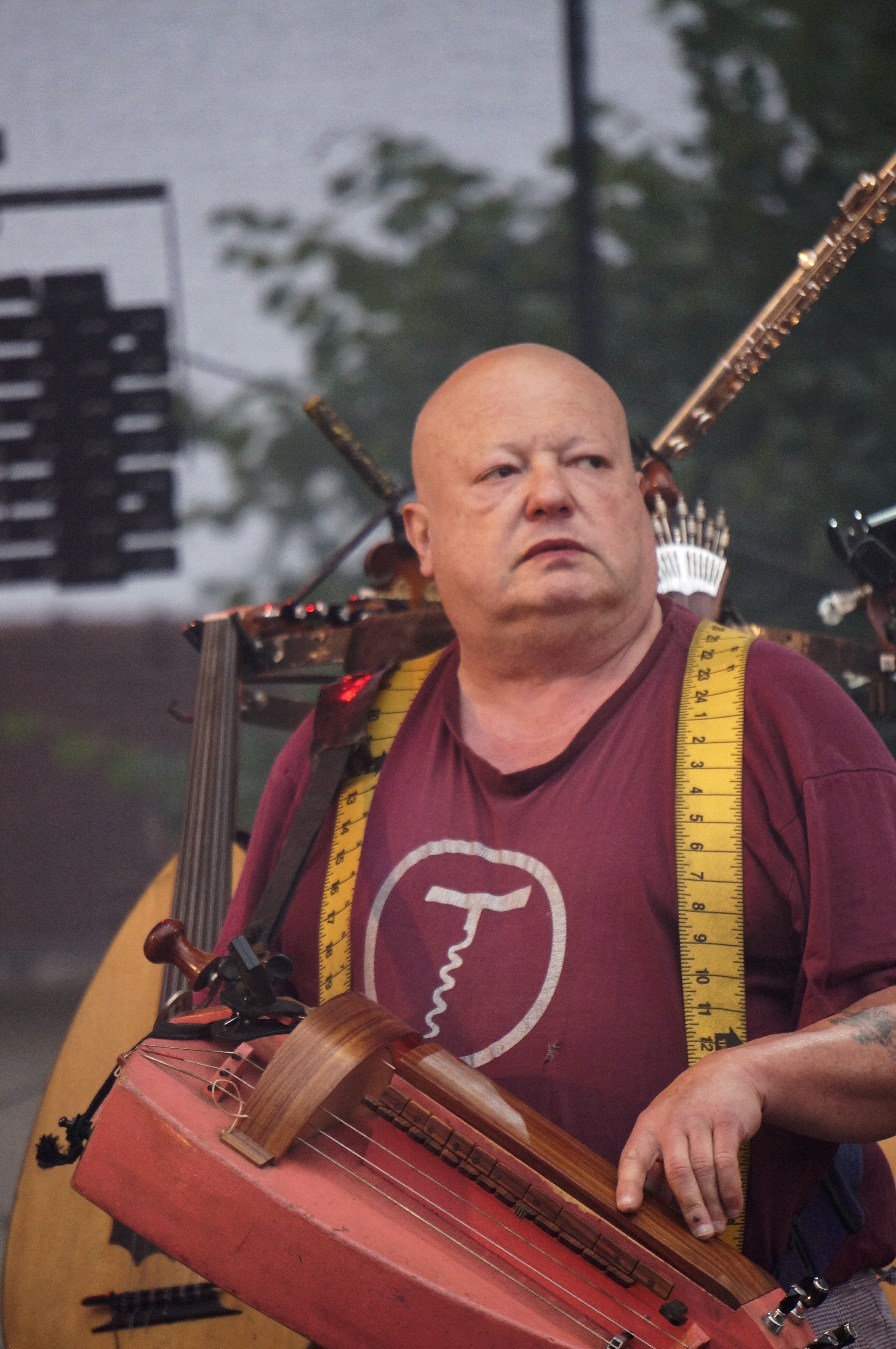 Pigalle (groupe) lors de Un été dans l'Aisne 2015 à Laon.